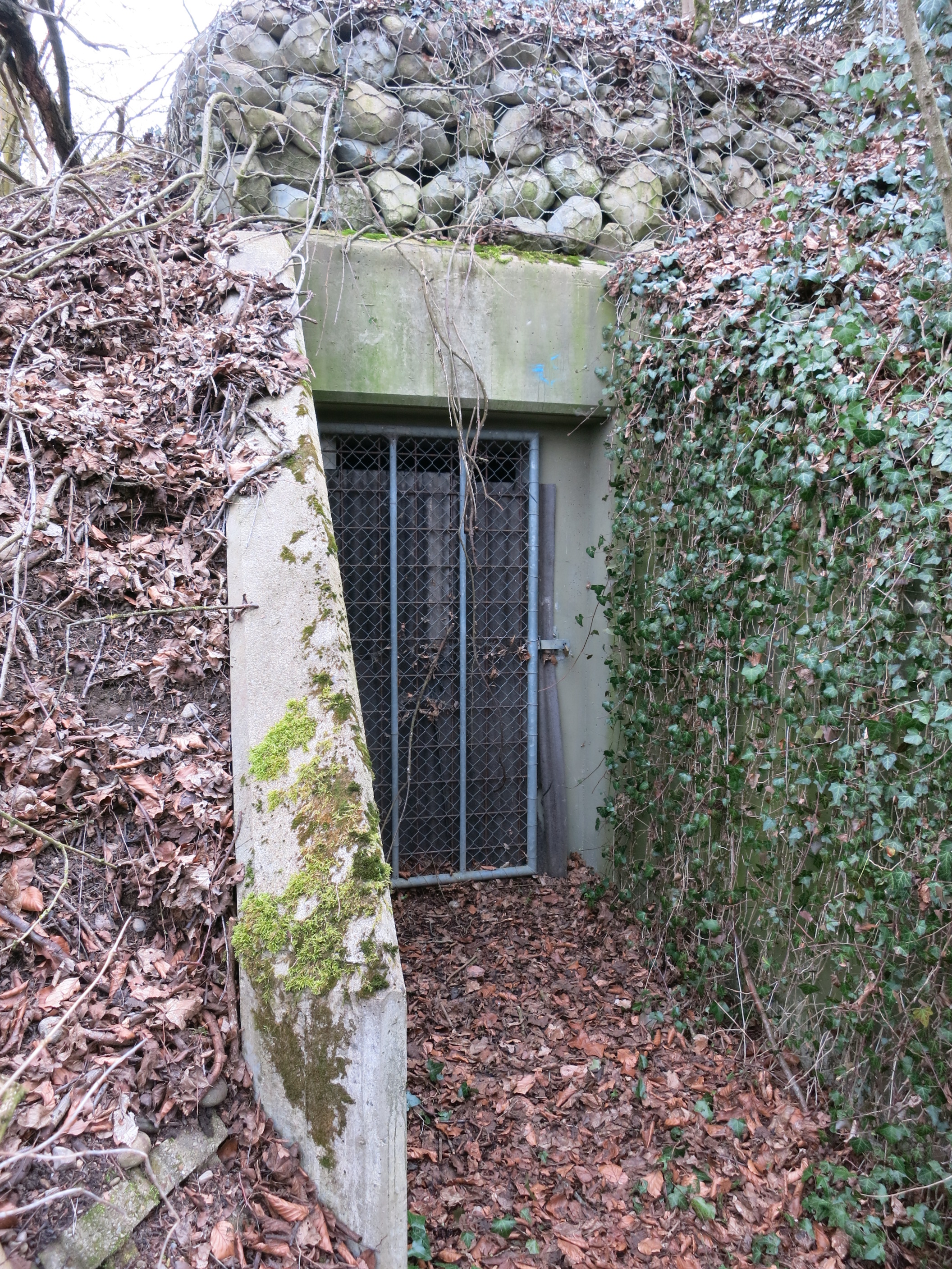 Sperrstelle Stadel, Stadel bei Niederglatt ZH, Schweiz